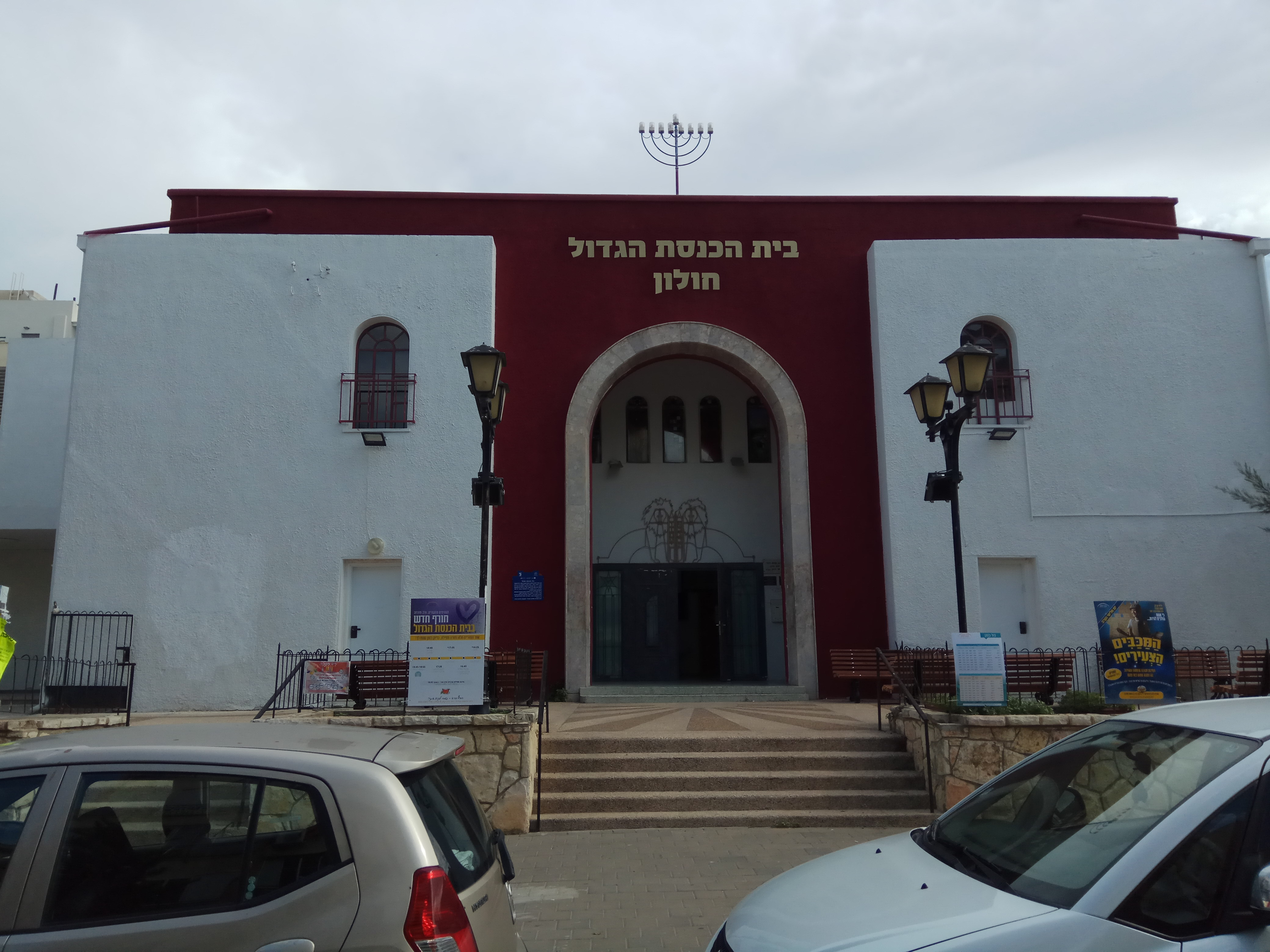 בית הכנסת הגדול בחולון, רחוב הרב קוק